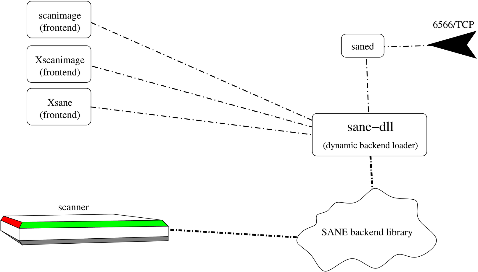 Figura 30.18. Schema di massima della struttura di SANE.